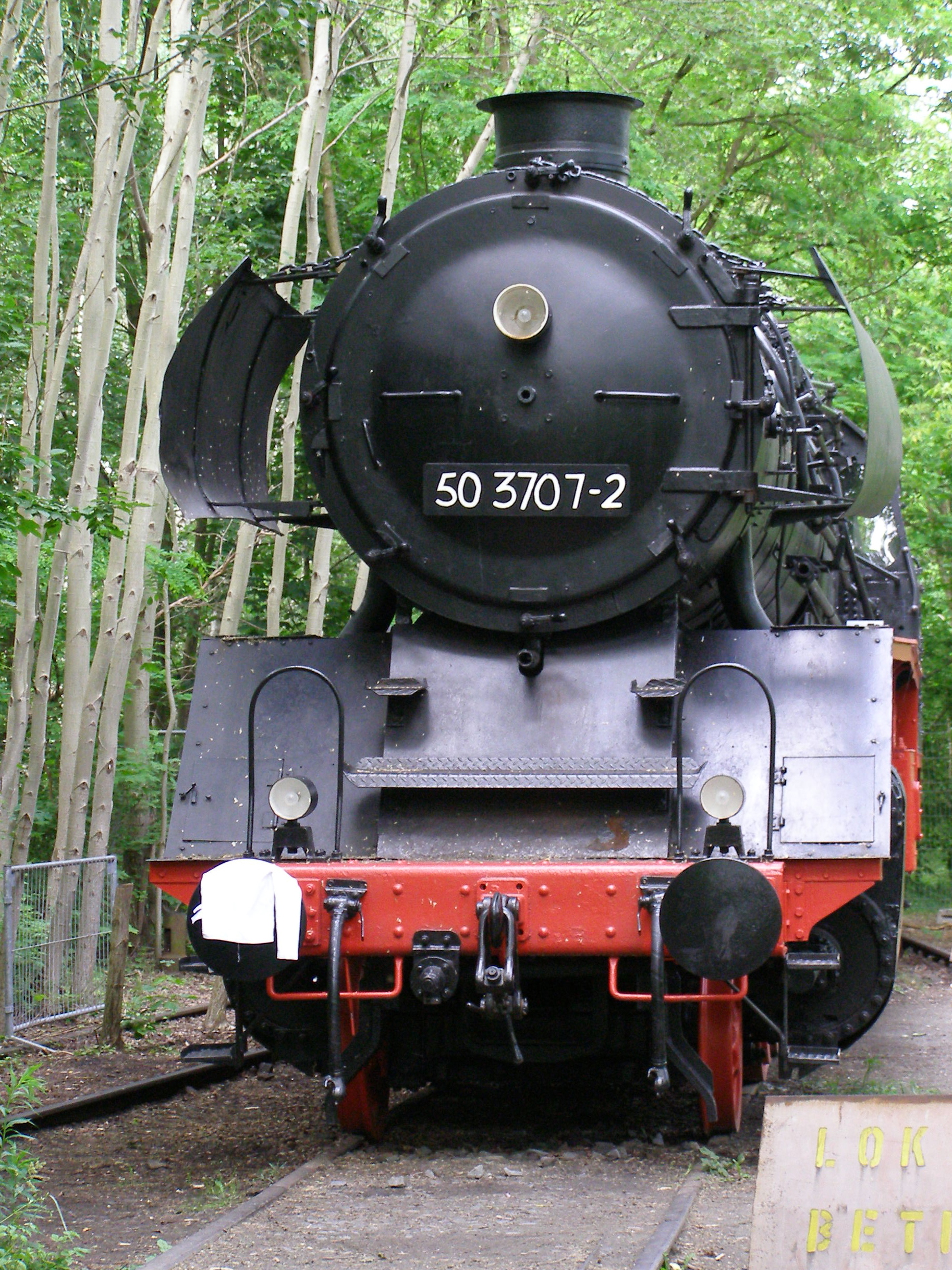 Rekolok DR 50 3707-2 (ursprünglich Henschel, 1940) im Natur-Park Schöneberger Südgelände, Berlin